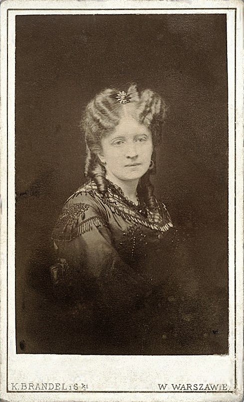 Jadwiga Łuszczewska (Deotyma) Dim: 8.6x5.4cm